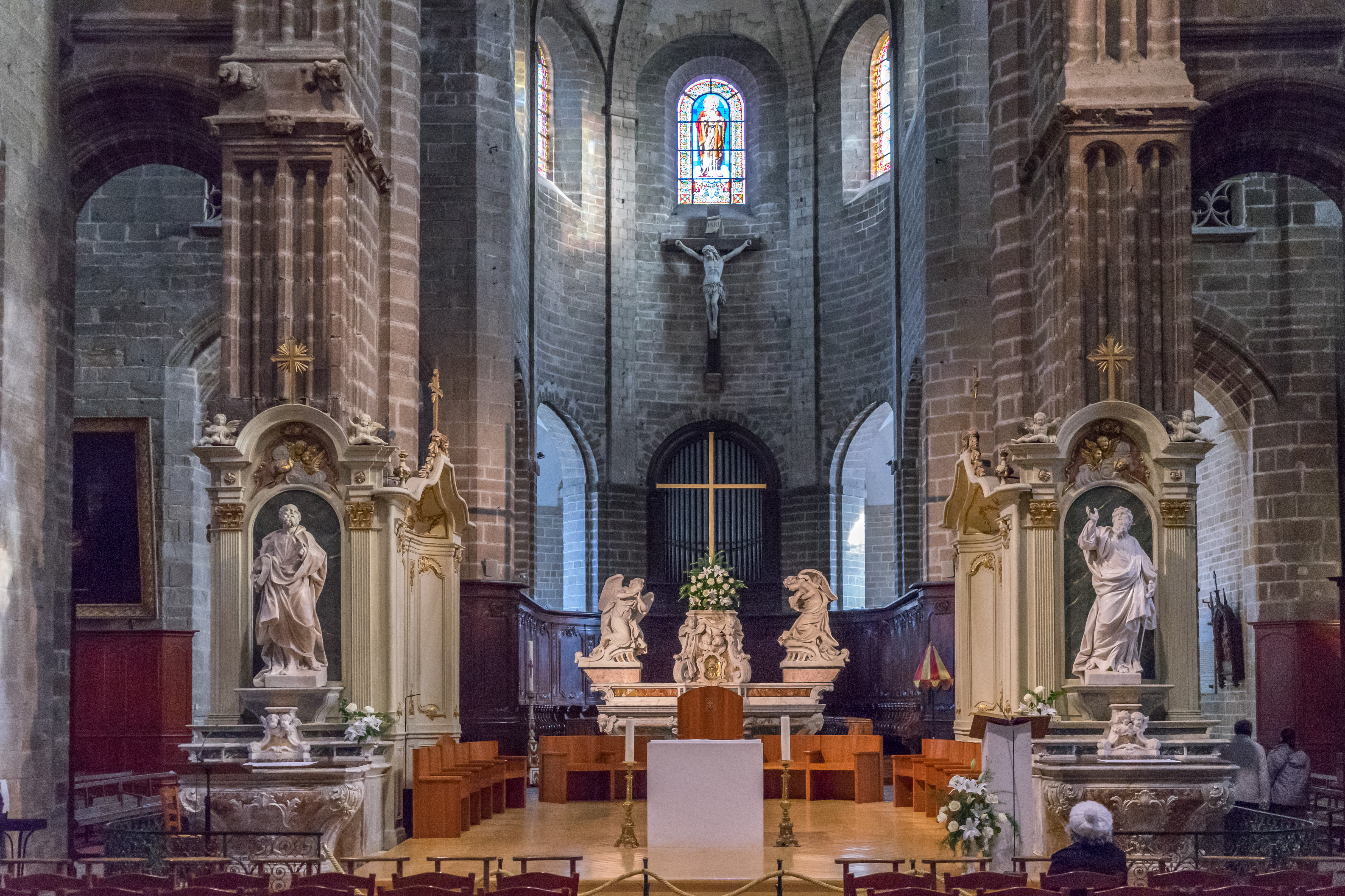 Vannes - Cathédrale Saint-Pierre - Choeur